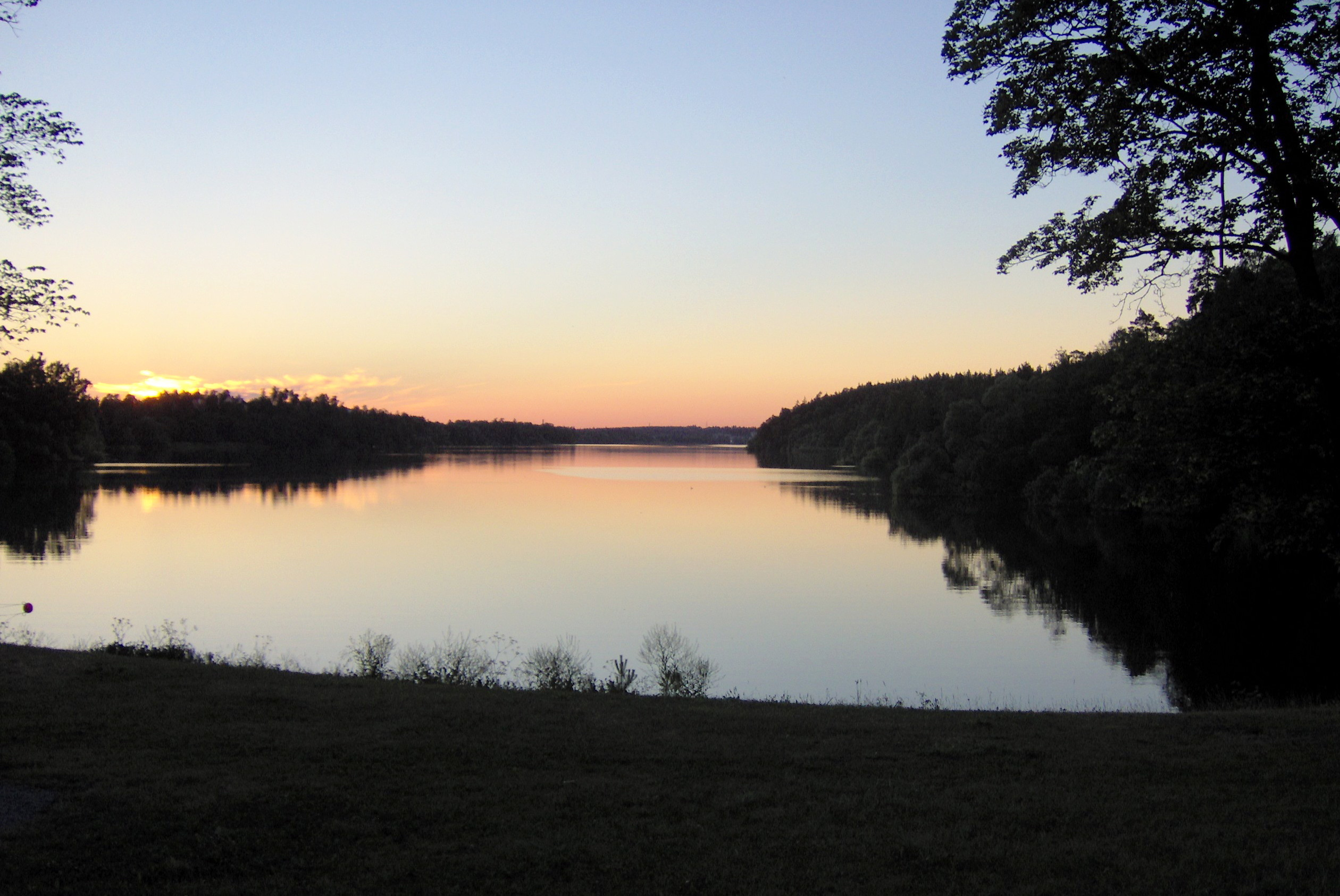 Picture of the lake Norrviken. Foto på sjön Norrviken.